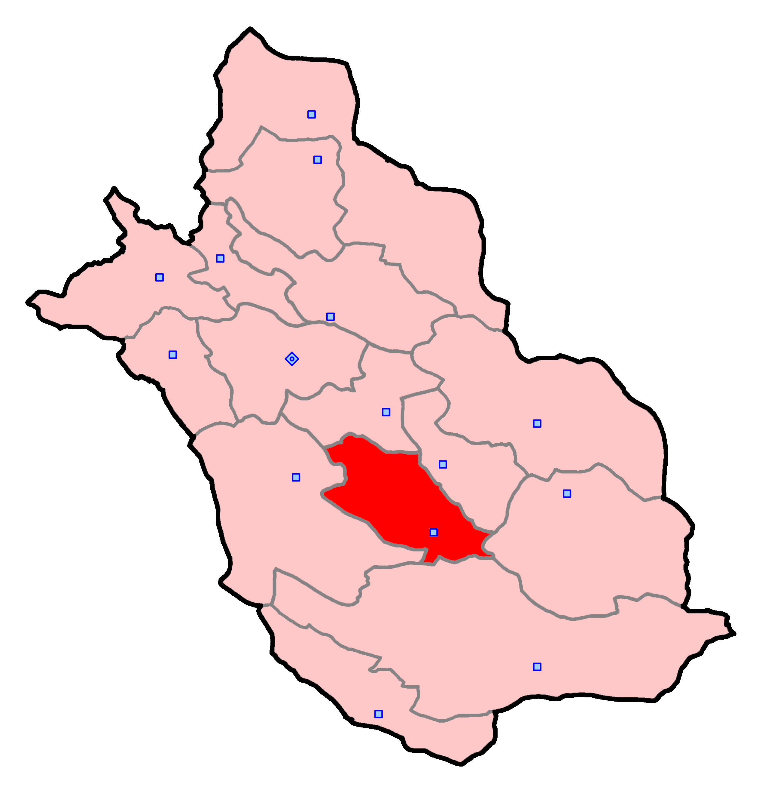 حوزهٔ انتخاباتی جهرم برای انتخابات مجلس شورای اسلامی